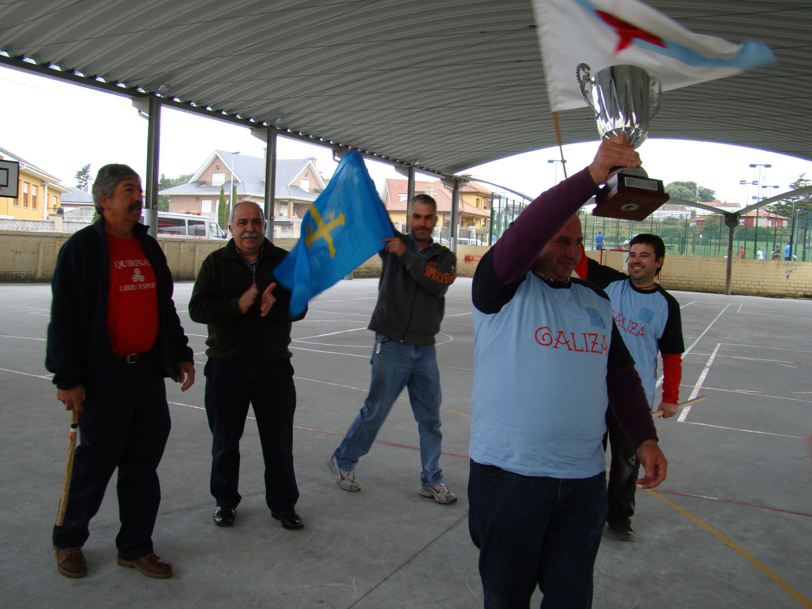 Entrega de a IV Copa Cantábrica al seleicionador gallegu, Flores.